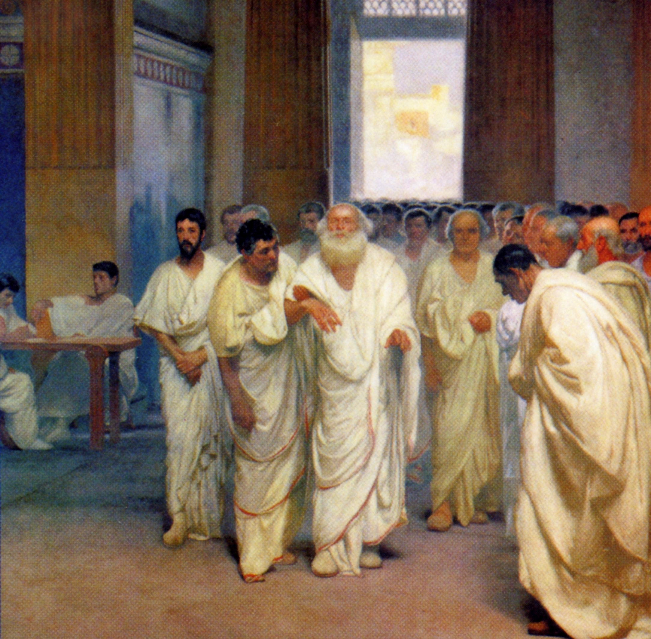 Appio Claudio Cieco accompagnato dai senatori nella Curia, simbolo del potere di Roma nell'epoca repubblicana.